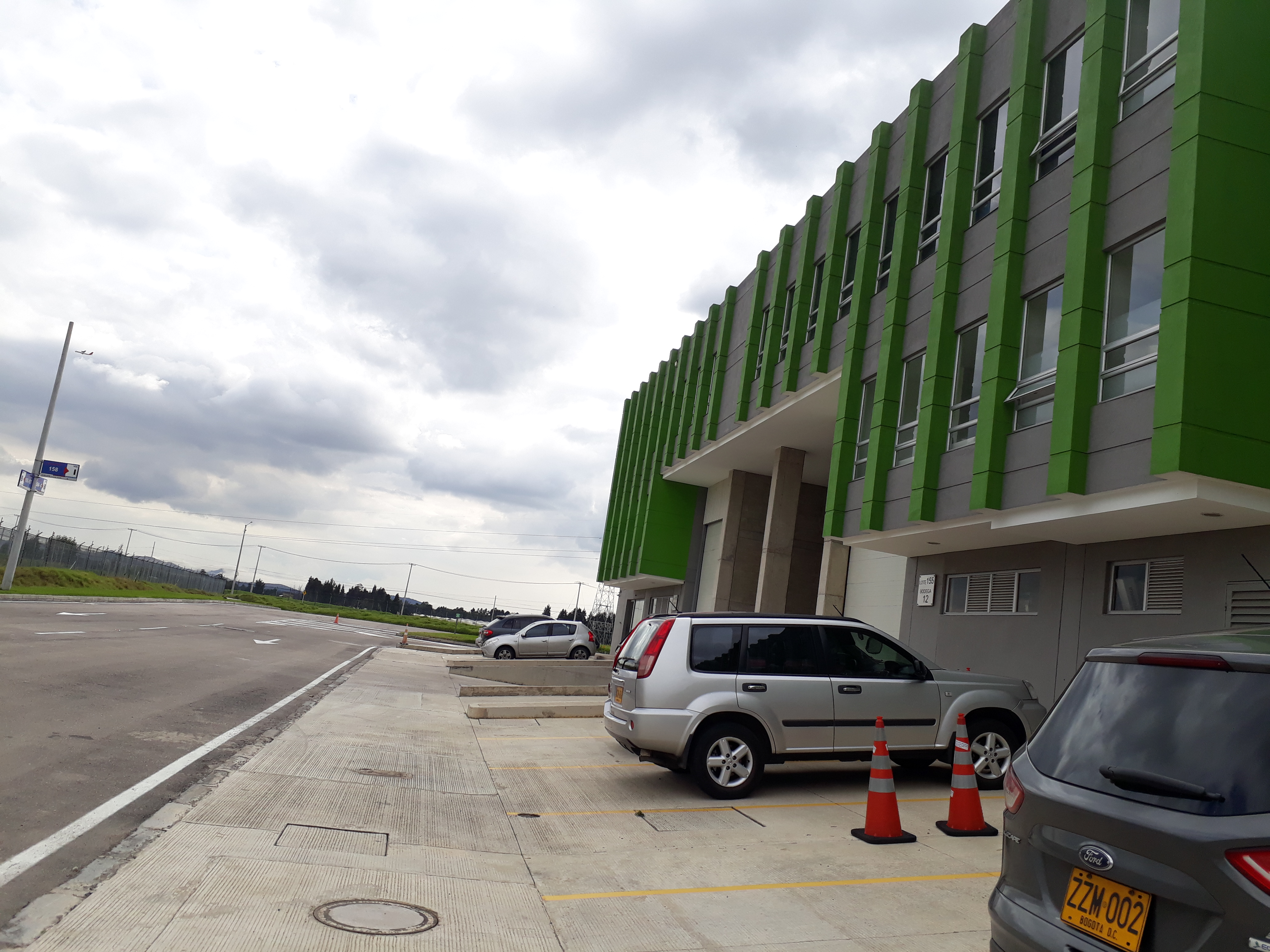 Keymarket en complejo empresarial Celta Trade Park